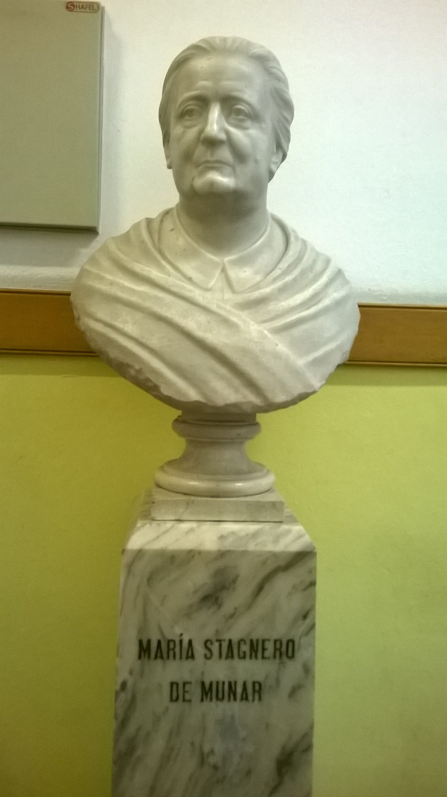 Busto de María Stagnero de Munar ubicado en el hall de los Institutos Normales “María Stagnero de Munar y Joaquín R. Sánchez”.